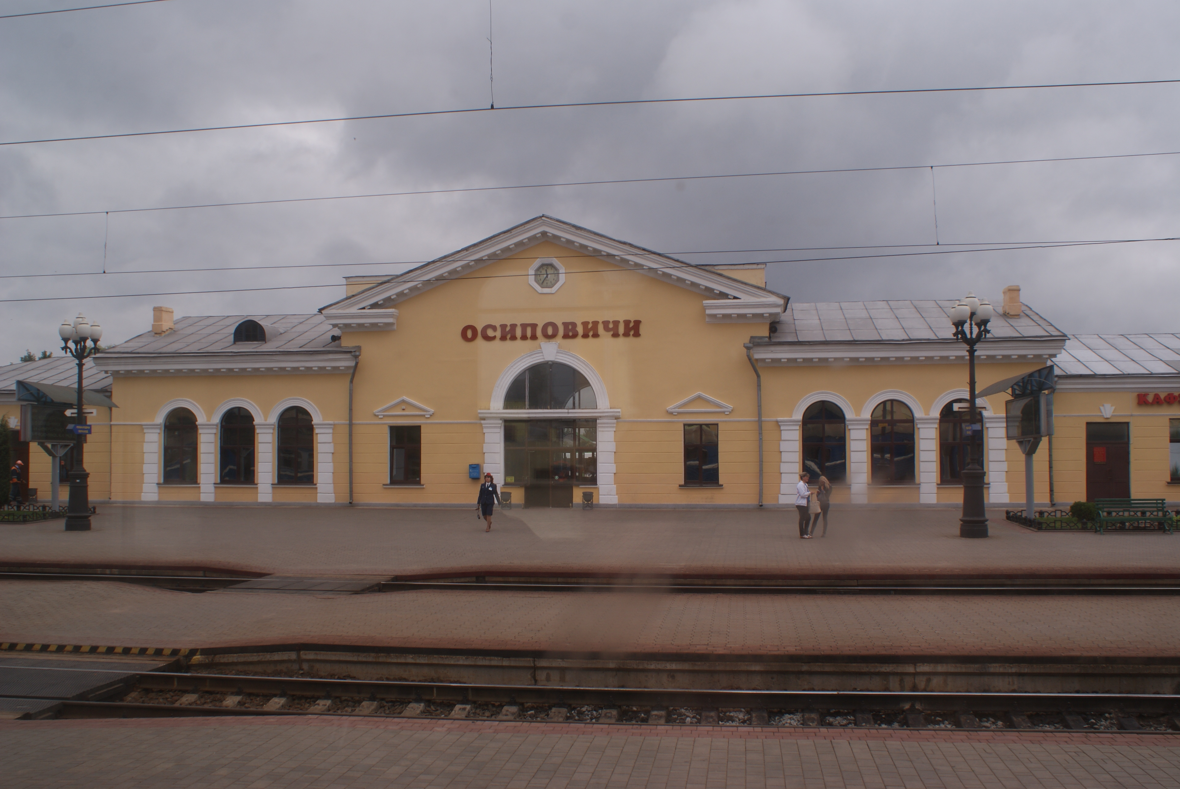 Асіповічы